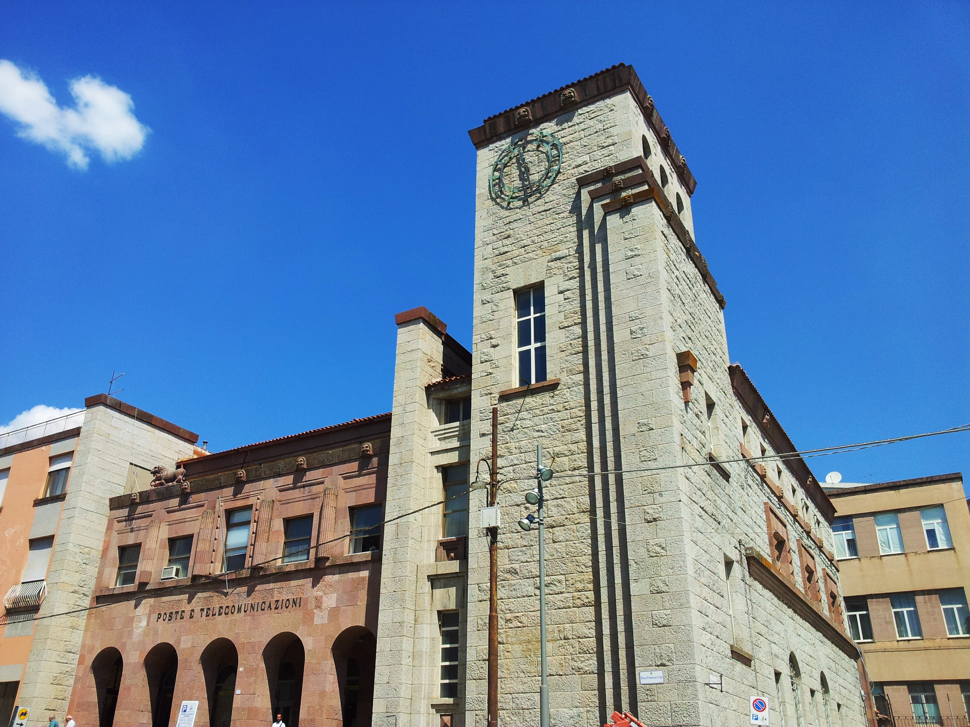 edificio di epoca fascista